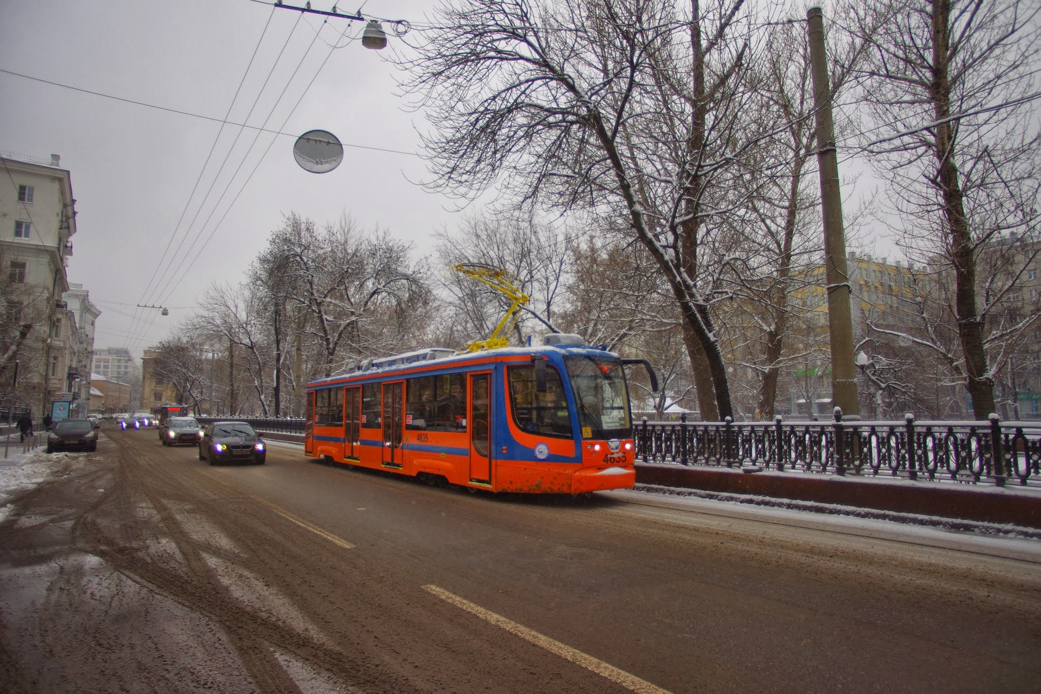 Basmanny District, Moscow, Russia // Внешняя сторона Чистопрудного бульвара у "Современника"